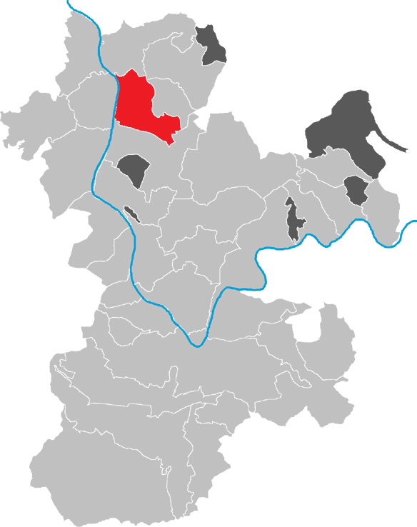 Karte von Kleinwallstadt im Kreis Miltenberg, Bayern, Deutschland.